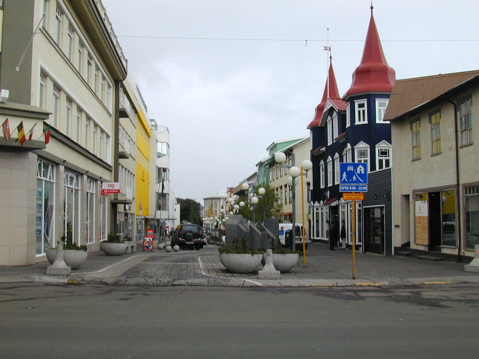 Centro de la ciudad Die Stadt Akureyri